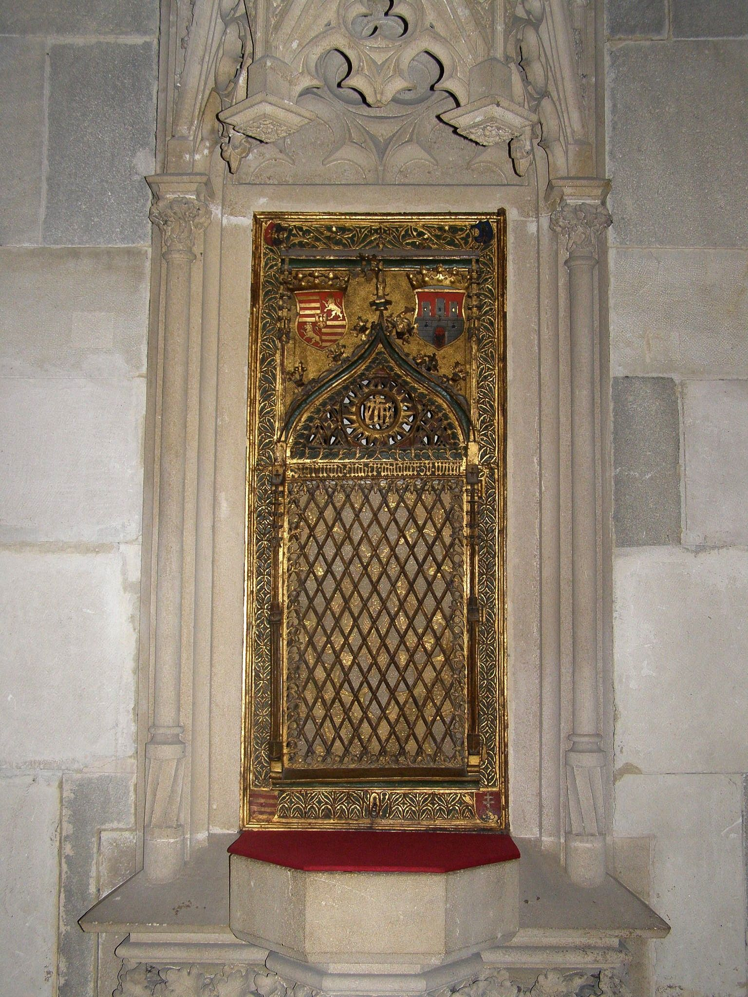 Neogotické pastofórium obsahujúce dverka z pôvodného pastofória z 15. storočia. Pieskovcový rám pastofória v podobe fiálového baldachýnu s piedestálom je dielom sochára Johanna Hutterera. Kovové dvierka zhotovil viedenský zámočník Sigismund Fischer. V roku 1867 dvierka dal zreštaurovať Štefan Rakovský, mešťanosta a spoluzakladateľ Mestského múzea, so svojou manželkou Helenou Majthényiovou. Dokladá to nápis na kamennej stuhe pod piedestálom pastofória doplnený osobnými erbami manželov a vročením 1867